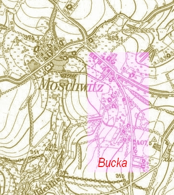 Die Ortschaft Moschwitz mit dem OT Bucka.